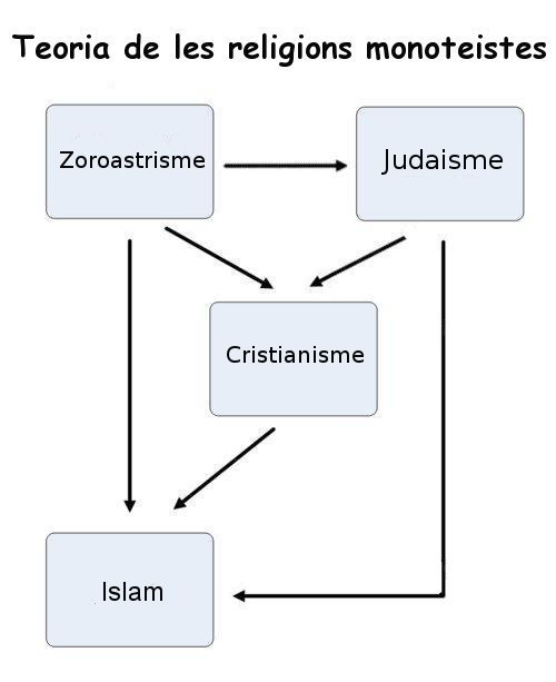 Teoria de les religions monoteistes segons Frazer i Joyce